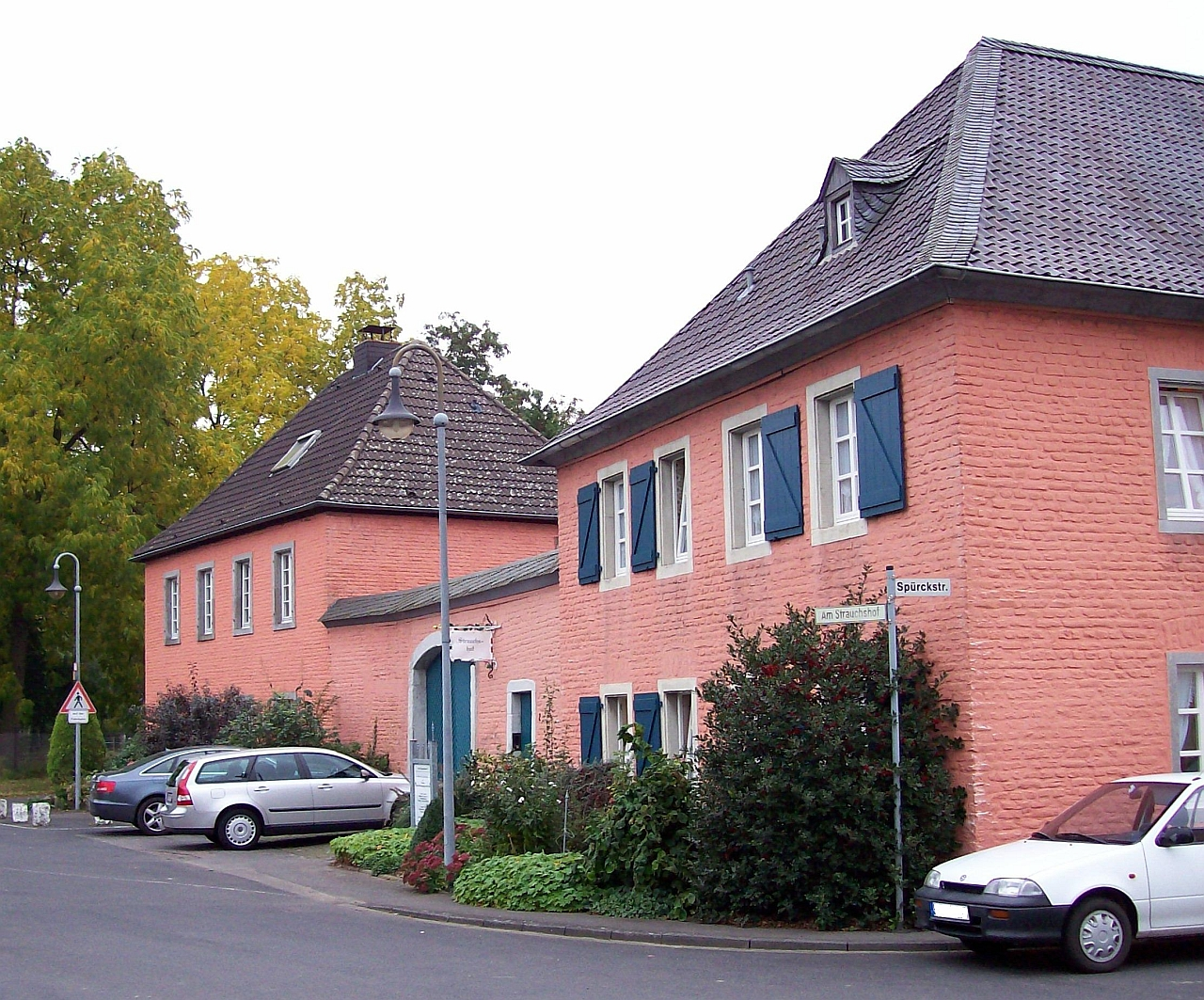 Struchshof Brühl (Germany)